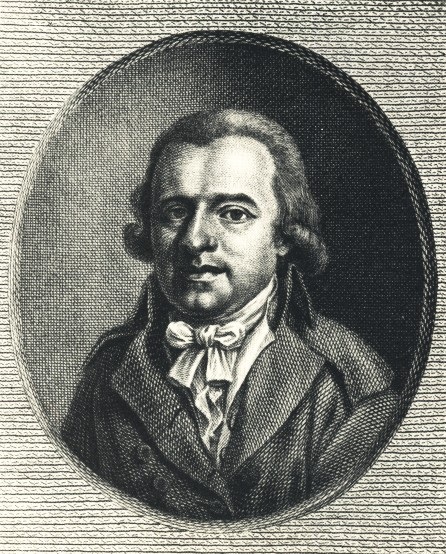 Stich (Ausschnitt), undatiert